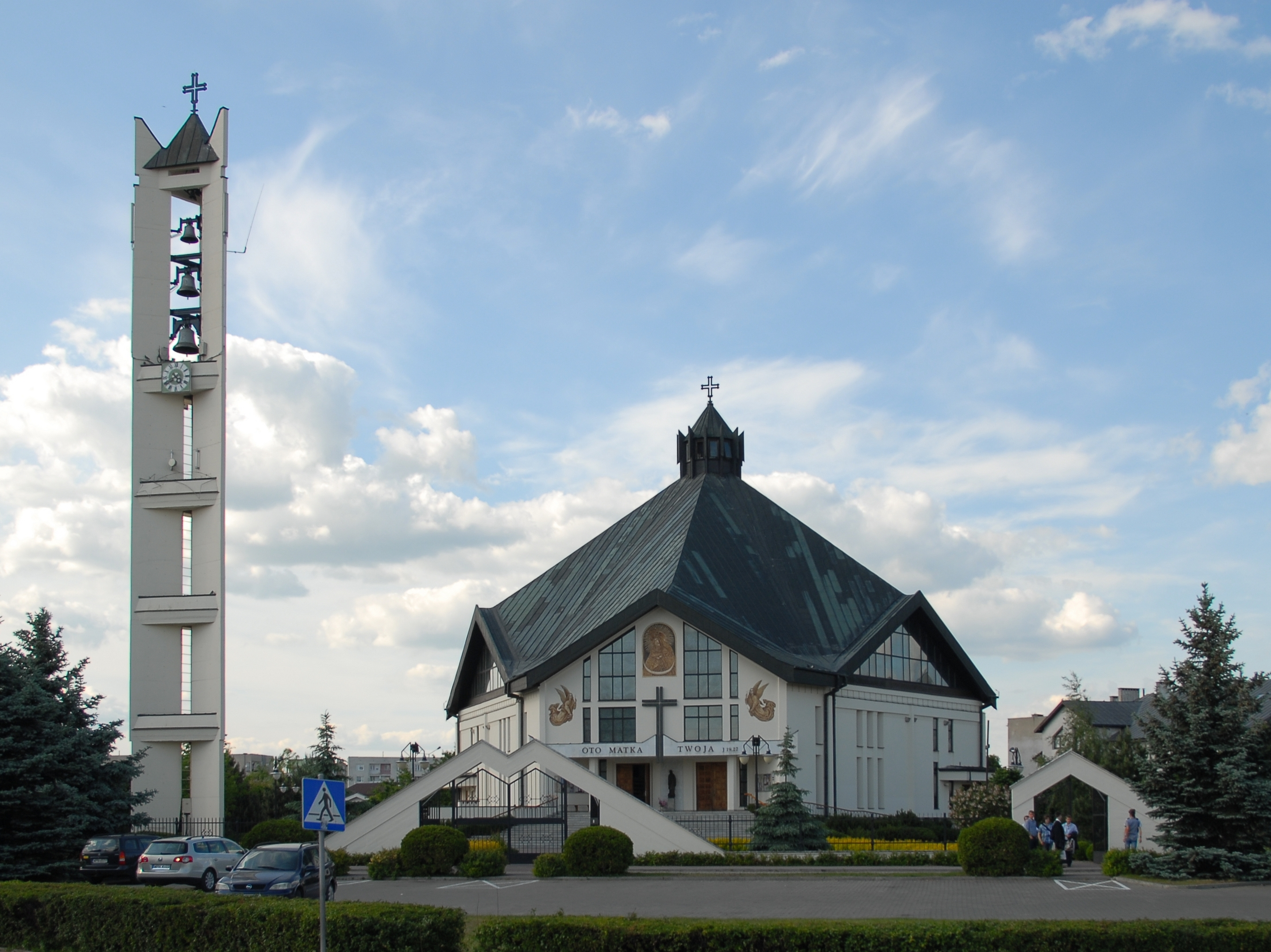 Kościół parafialny pw. św. Maksymiliana Kolbego w Płońsku